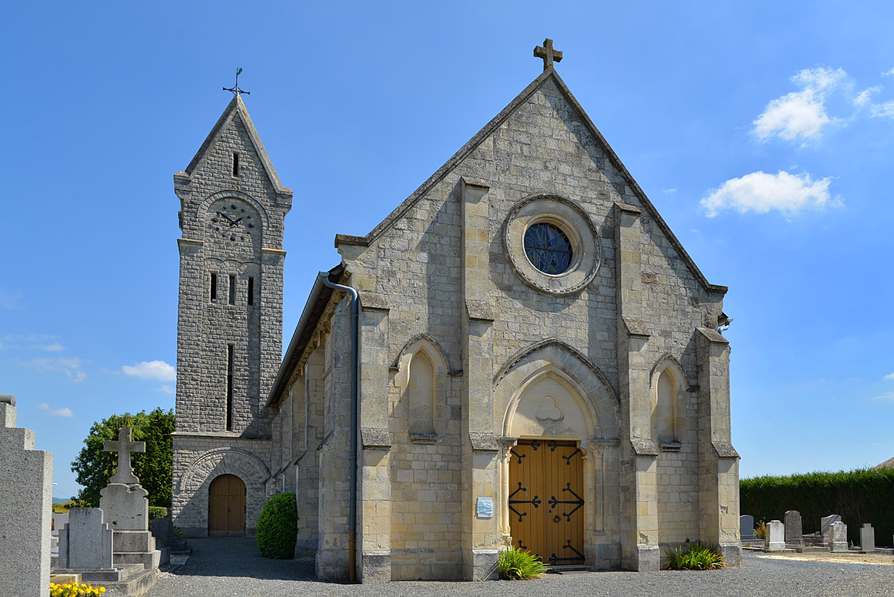 Goustranville (Calvados)